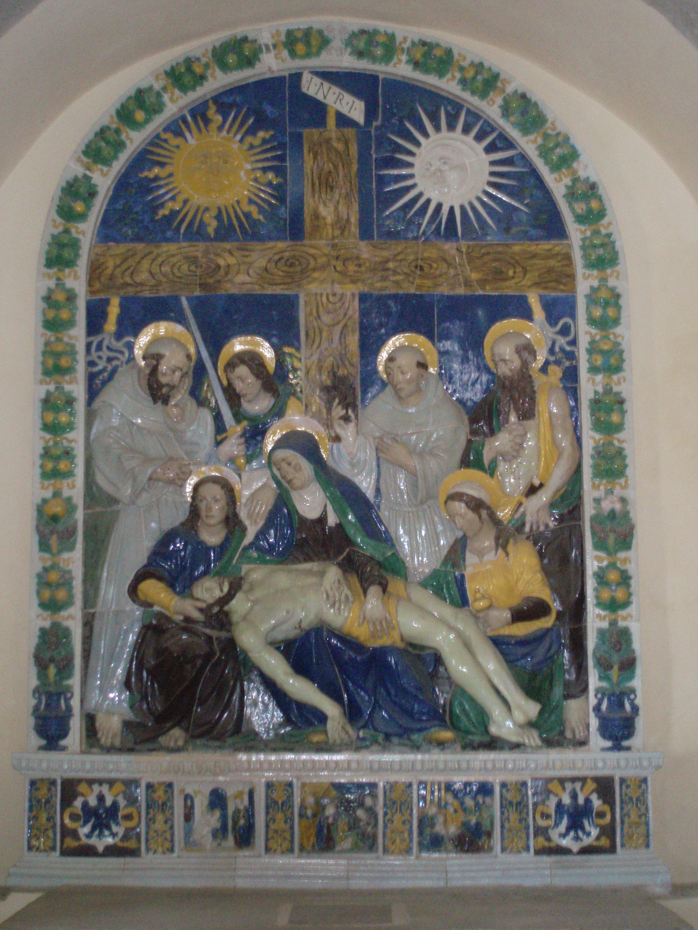 Santi Buglioni, Pietà. Terracotta smaltata nel Santuario della Verna, a Chiusi - Cappella della Pietà.